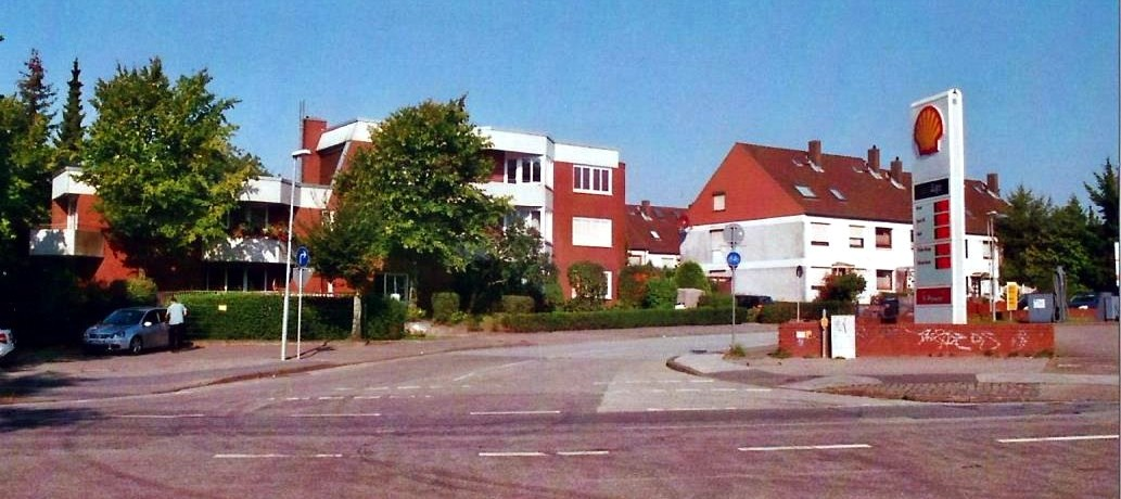 Einstige Fabrikgrundstücke der „Hanseatischen Chemisch-Technische Werke Kayser & Co.“